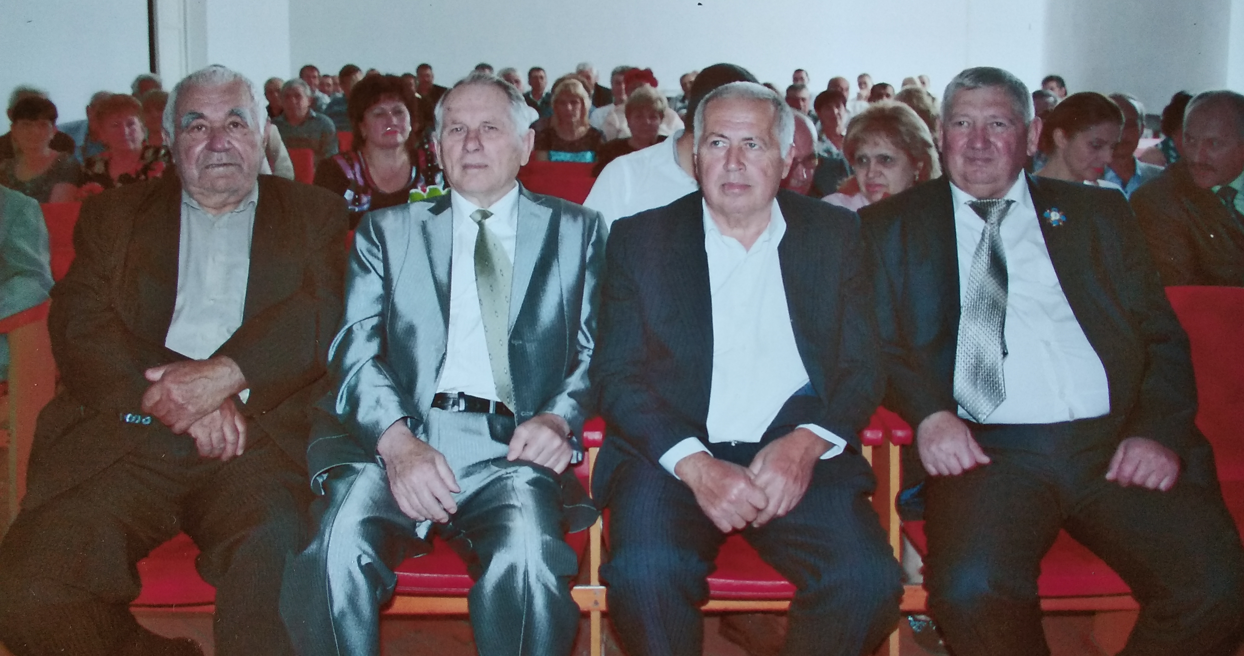 Керівники Софіївського МУВГ - Андрущенко В. Л., Бородачик А. С., Горб Б. С., Семеряга В. Г.